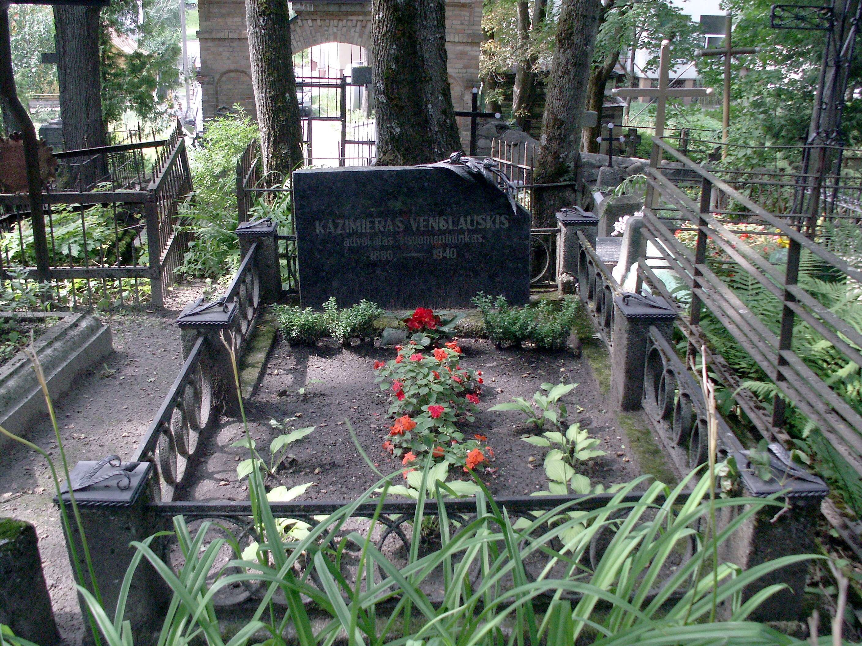 Šiaulių senosios kapinės. Kazimiero Venclauskio kapas.